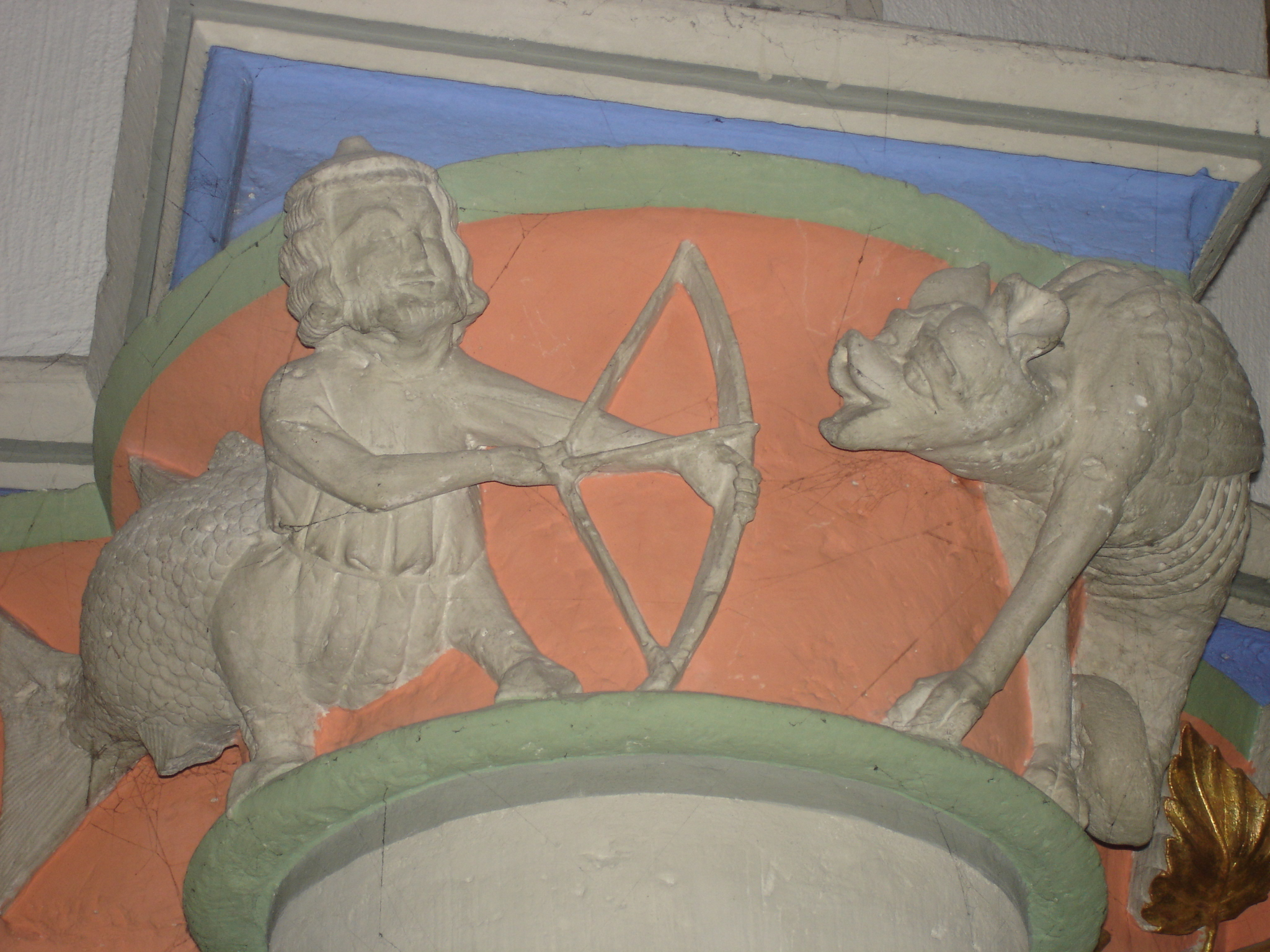 Aegidienkirche Braunschweig Verzierungen an den Kapitellen der Gewansäulen des Chorumgangs.